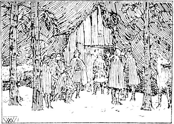 Wilhelm Wetlesen: Illustration for Haraldsønnenes saga (Inges saga), Heimskringla 1899-edition. nn: «Sigurd og følgjet hans i helleren i Gljuvrafjord.»